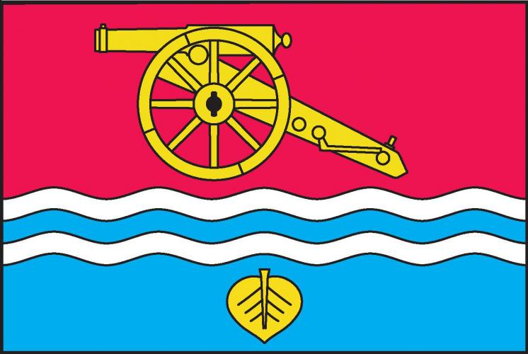 Benátky (HK), vlajka